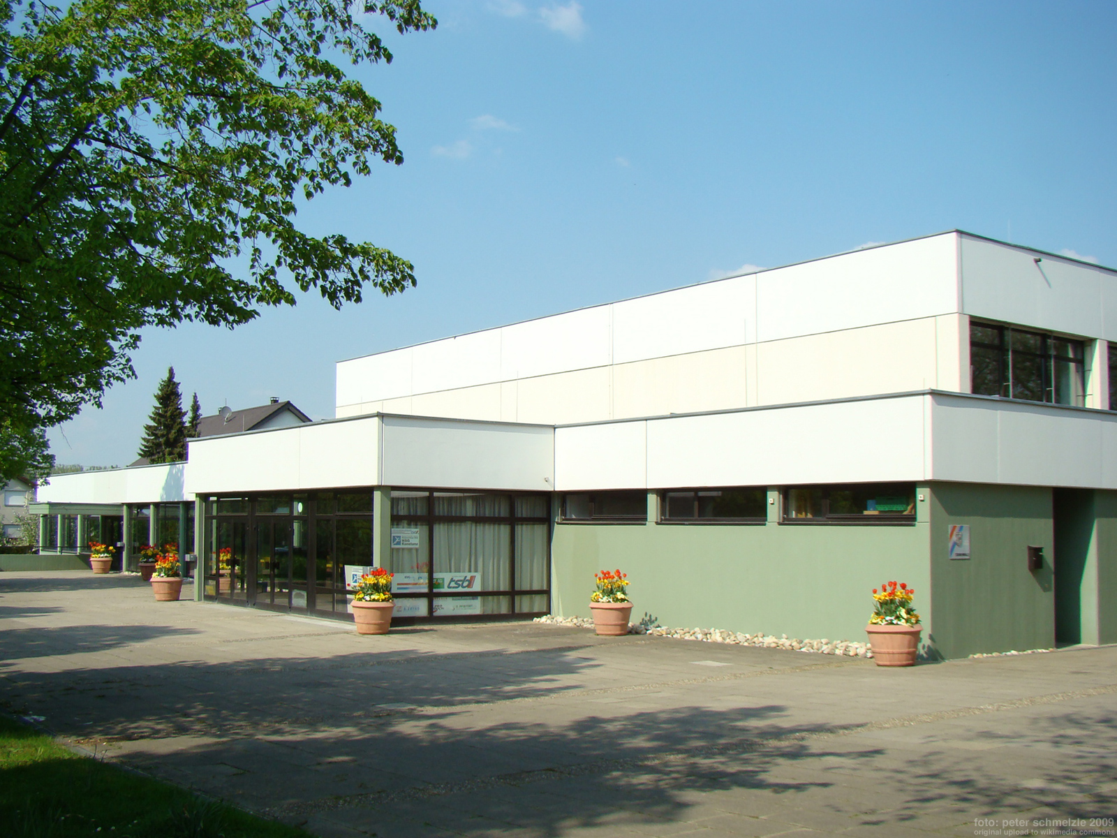 Stauwehrhalle in der Nussäckerstraße in Heilbronn-Horkheim